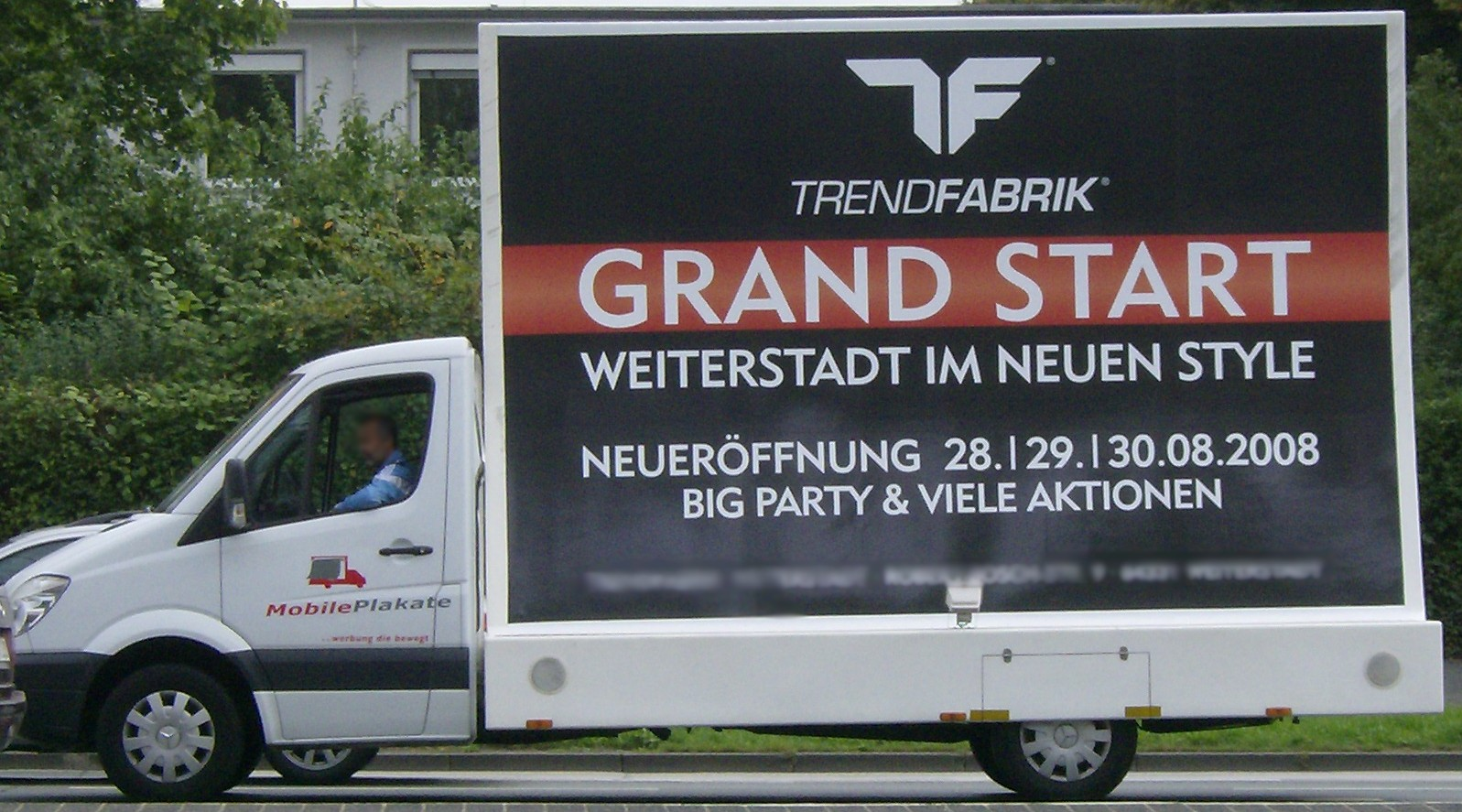 Ein Nutzfahrezeug, welches speziell für Werbung ausgerichtet ist